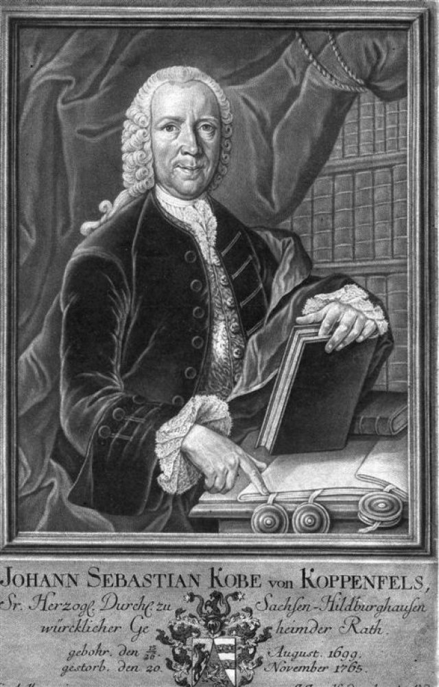 Kupferstich von Georg Albrecht Meuser nach einer Zeichnung von Johann Jakob Haid, um 1760 Inschrift: G.A. Meuser pinx Inschrift: J.Jac.Haid sculps. Aug. Vind. Inschrift: JOHANN SEBASTIAN KOBE von KOPPENFELS, / Sr. Herzogl. Durchl. zu - Sachsen-Hildburghausen / würcklicer Ge - heimder Rath. / gebohr. den 15/26. - August. 1699. / gestorb. den 20. - November 1765.